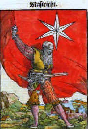 Armorial de Maastricht dans l'armorial de maître IK